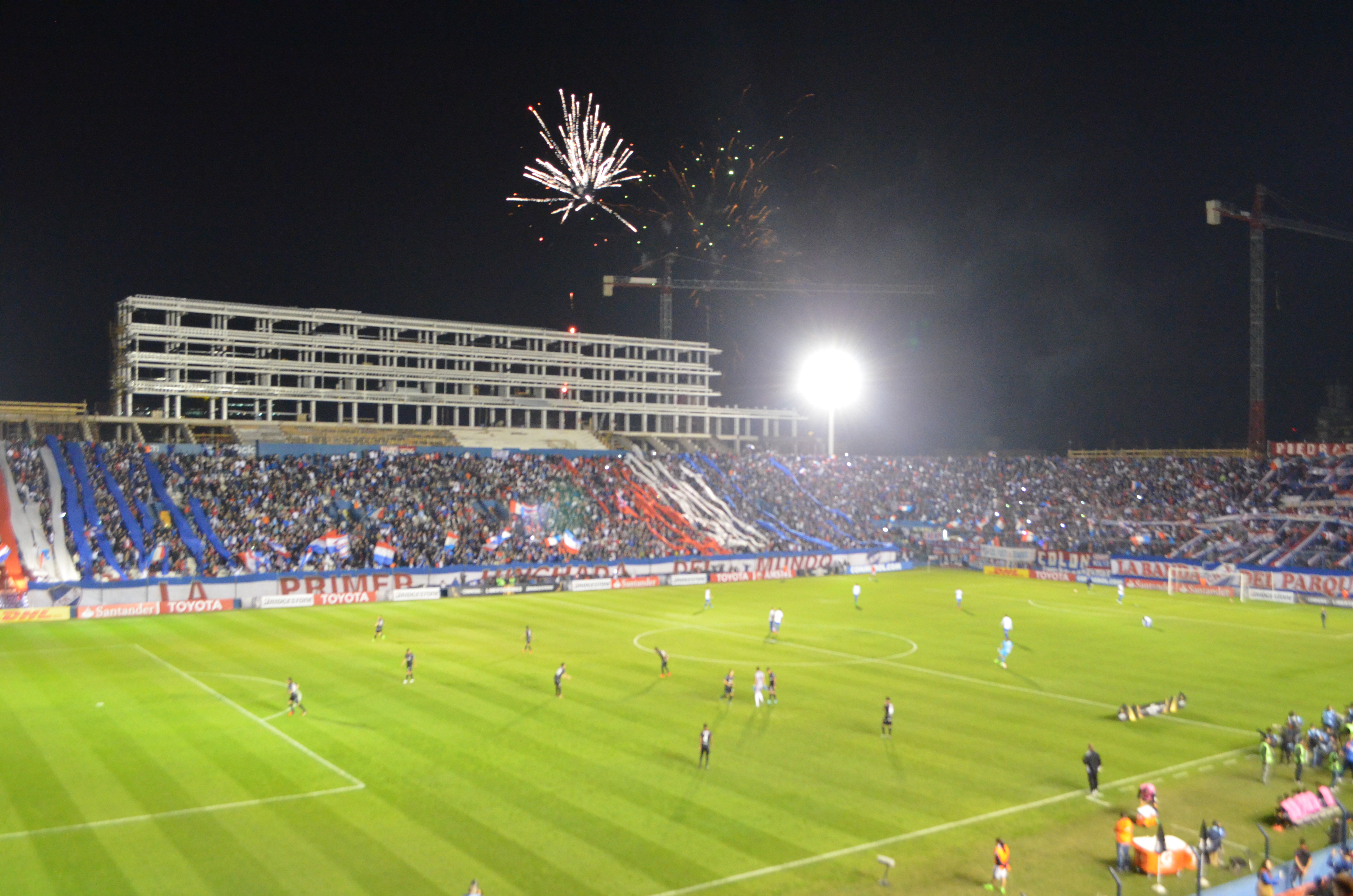 Imagen del partido disputado entre Nacional y Lanús, en el estadio Gran Parque Central, por la fase de grupos de la Copa Conmebol Libertadores 2017